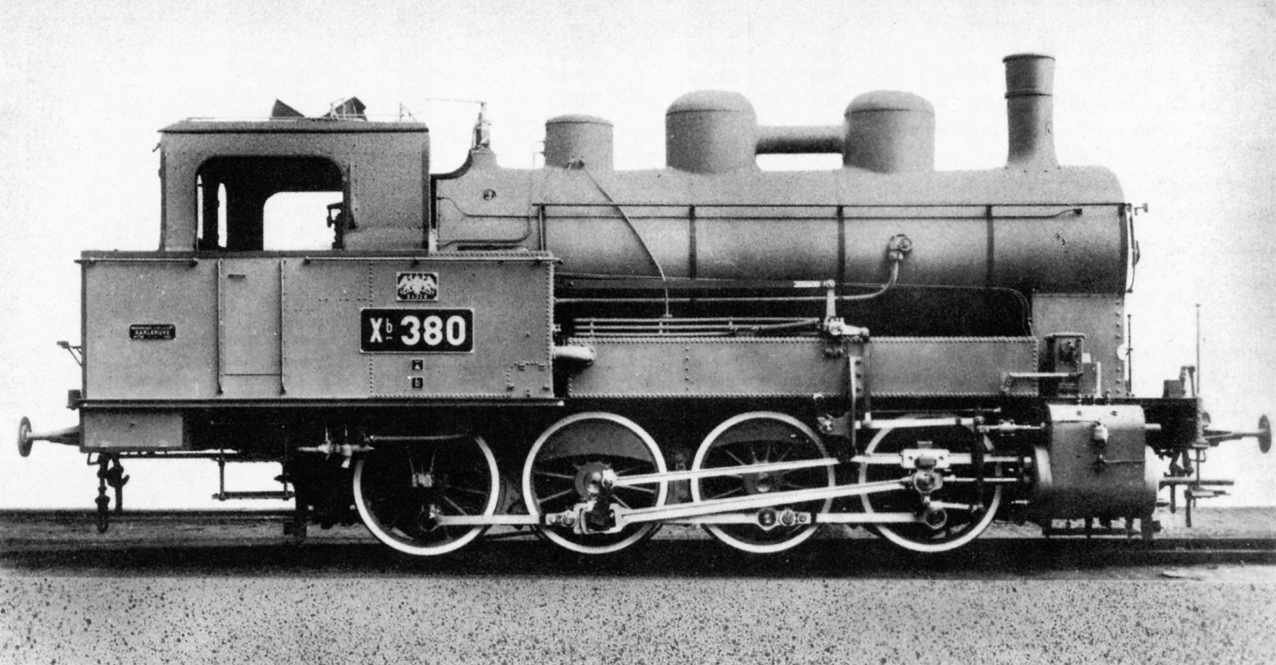 Dampflokomotive Badische X b.